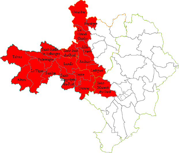 Cinquième circonscription législative du département du Gard